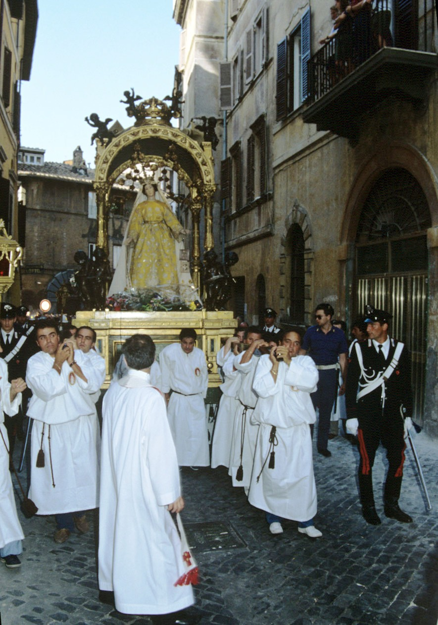 Processione a Trastevere per la Festa de Noantri